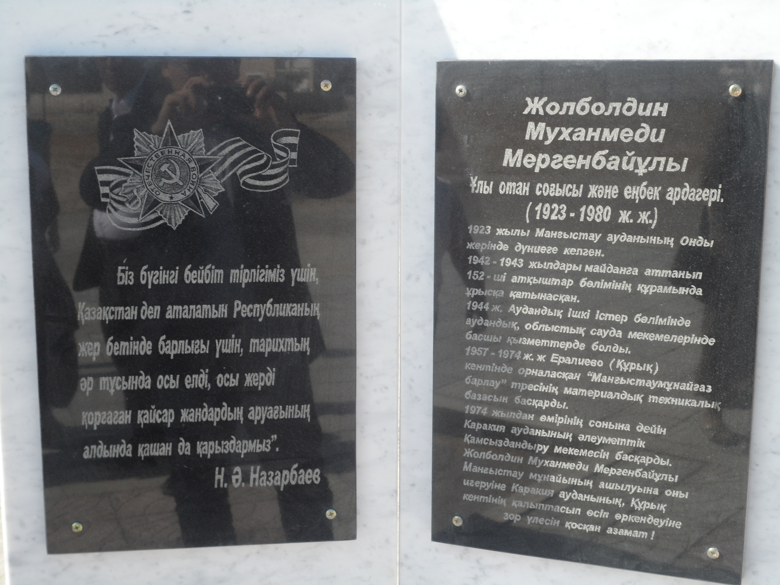 Құрық. Демалыс орны.